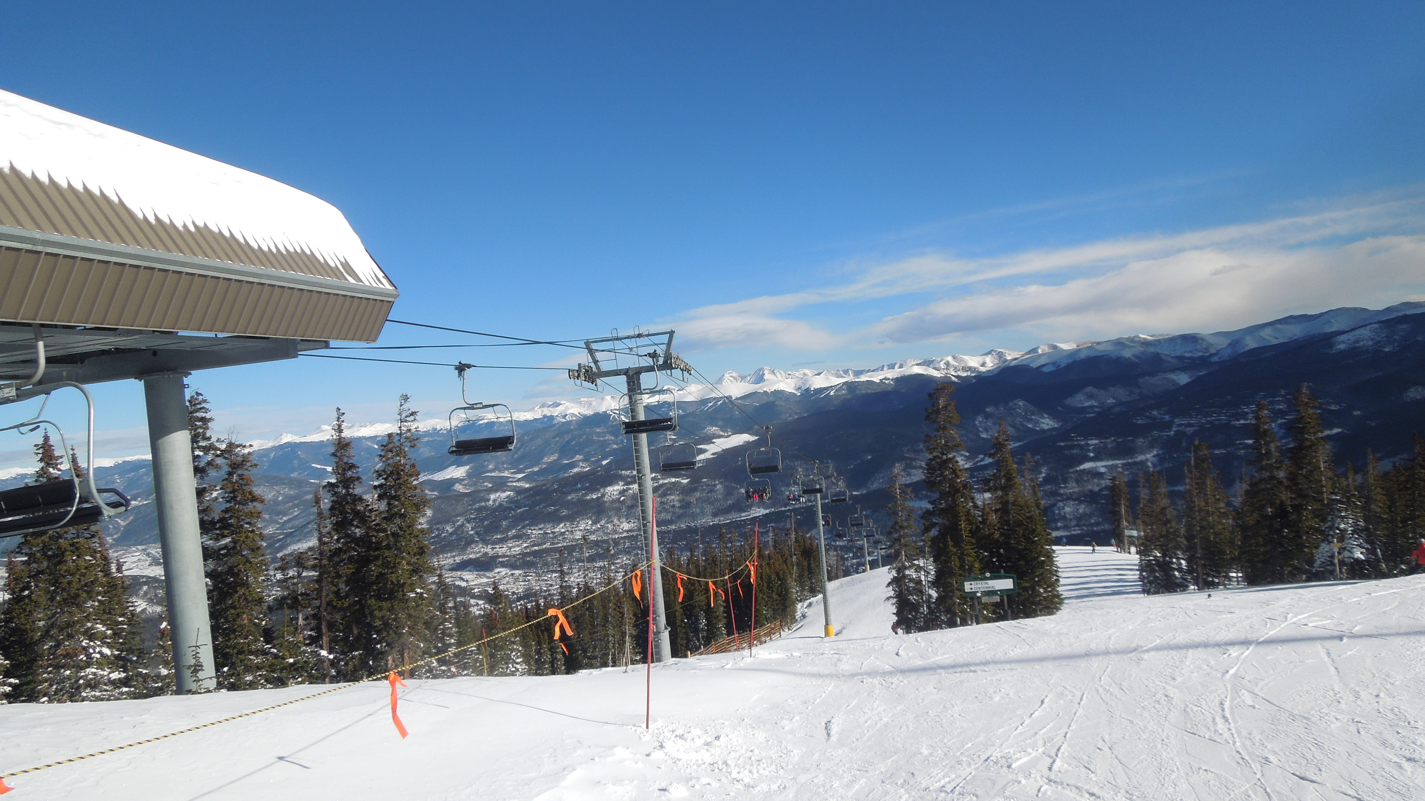 Sunny morning at Breckenridge Ski Resort. Taken December 26 2013. DReifGalaxyM31 (talk) 06:11, 15 January 2014 (UTC)